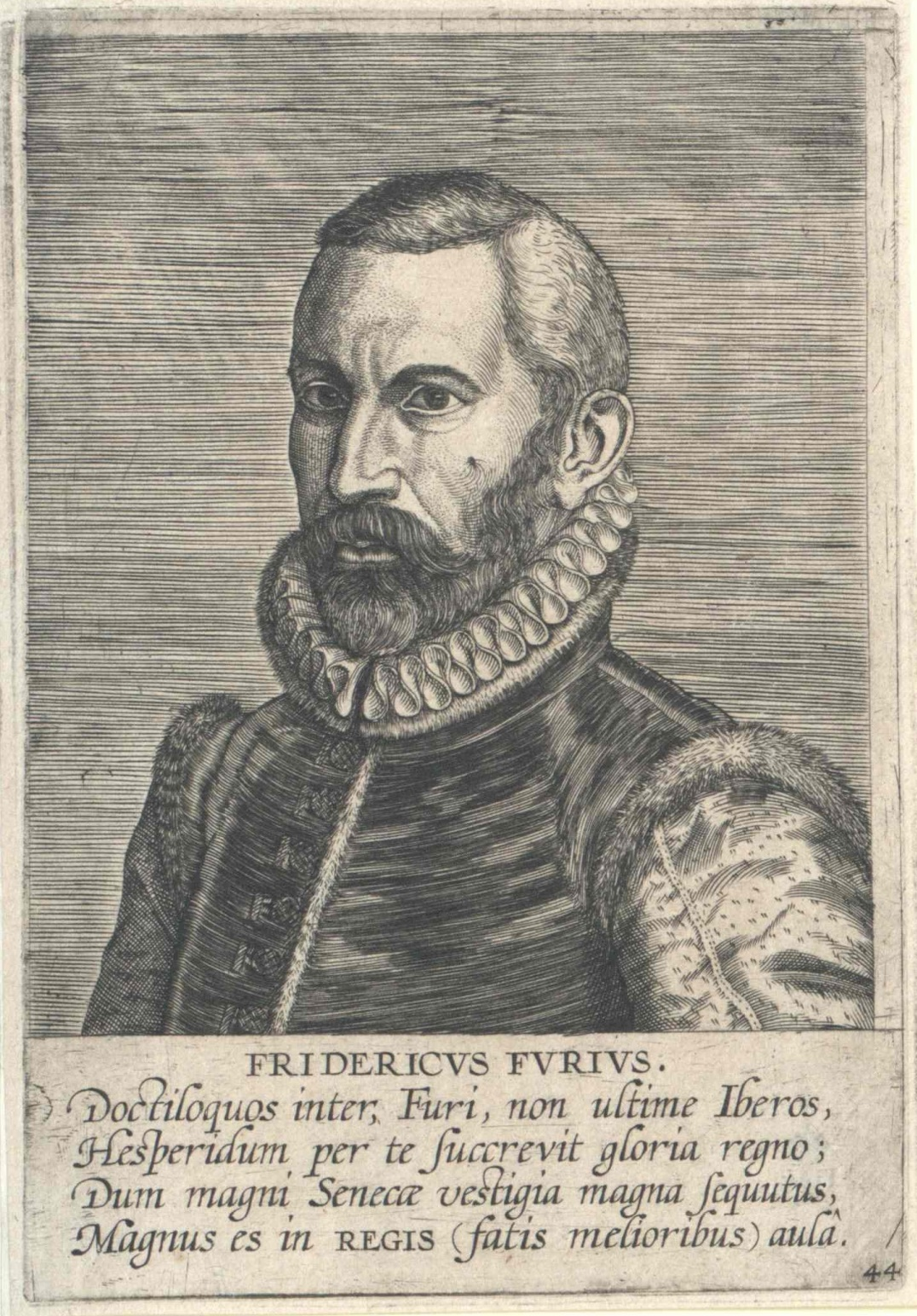 Retrato de Fadrique Furió Ceriol,grabado en cobre de Philips Galle, Imagines L. doctorum virorum, qui bene de studiis literarum …, Amberes, 1587, Österreichische Nationalbibliothek